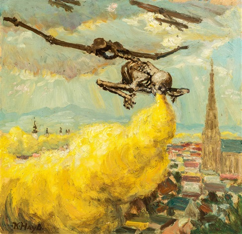 Karl Hayd Gas - Tod - Angriff über Linz , 1942